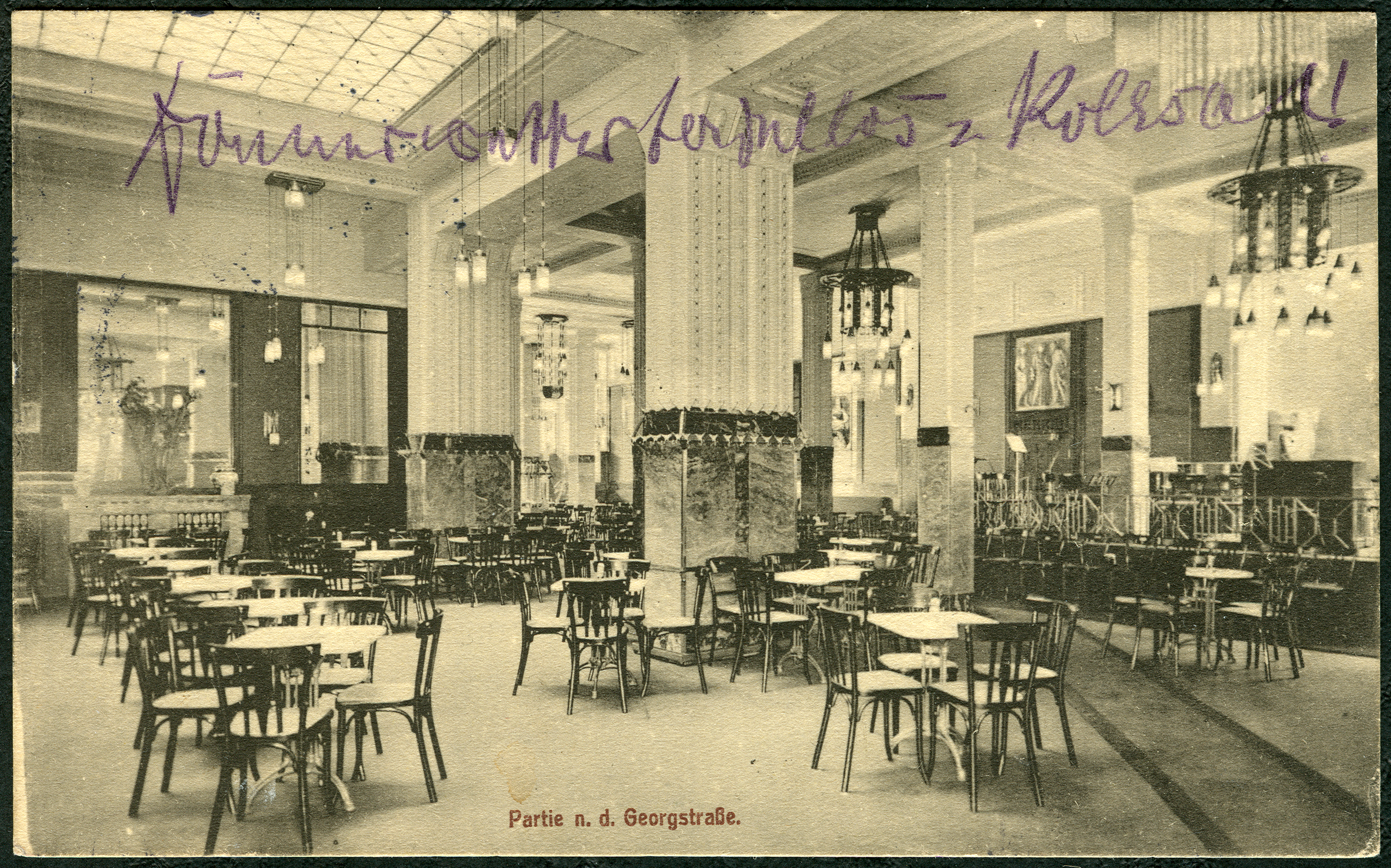 Ansichtskarte mit einer der Innenaufnahmen aus dem Café Continental, Hannover, hier die „Partie n. d. Georgstraße“ um 1910 aufgenommen von dem Architekturfotografen Edmund Lill. Links oben in dem lichtdurchfluteten, saalähnlichen Café ist das Vestibül zu erkennen, ganz rechts die erhöhte und Konzertbühne mit Geländer, Klavier und Notenständern für weitere Musiker ...